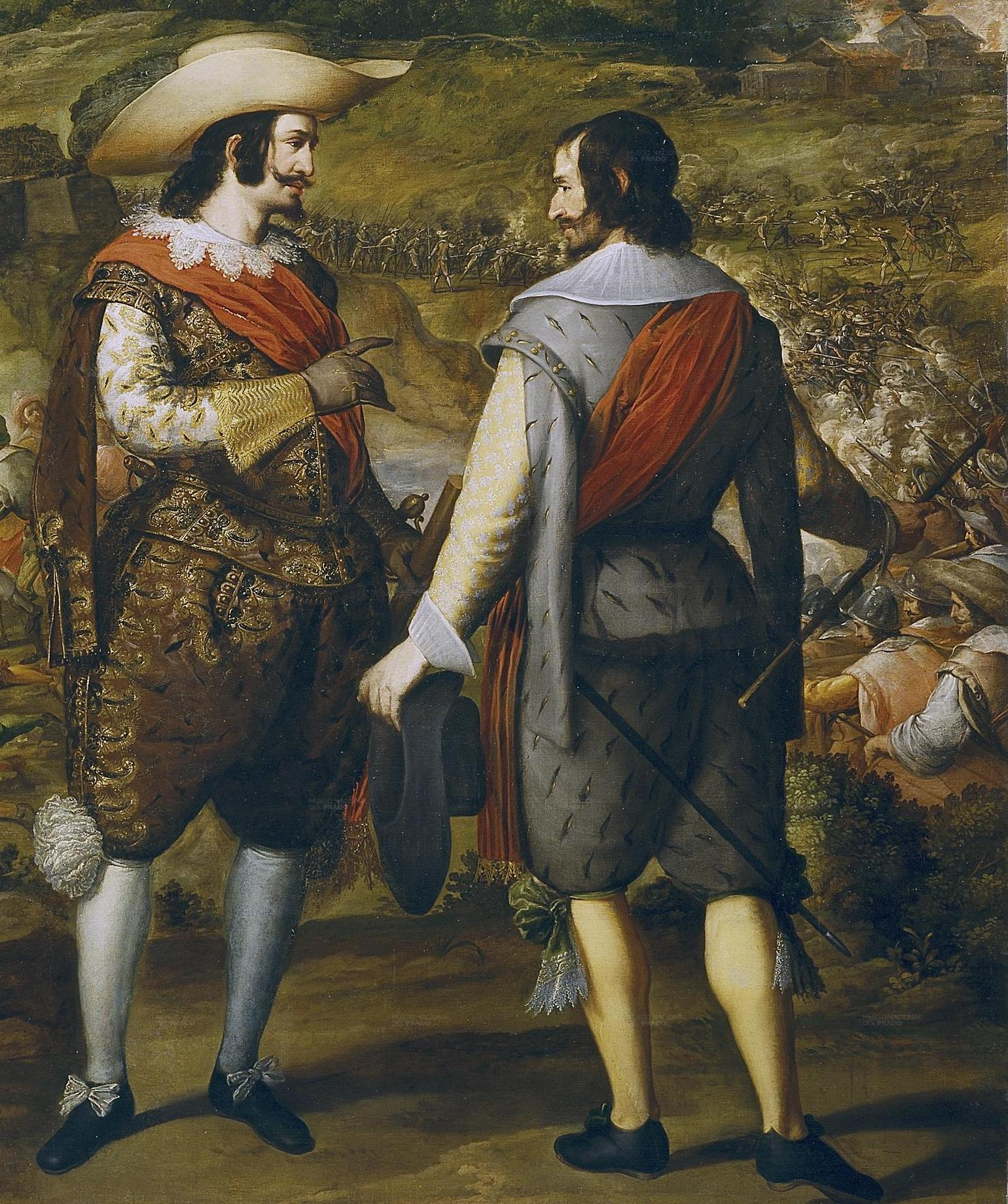 Detalle del cuadro que representa la recuperación de la Isla de Puerto Rico en 1625 por las tropas españolas a las órdenes de Juan de Haro y Sanvítores (1545-1631), gobernador de Puerto Rico y caballero de la Orden de Santiago.